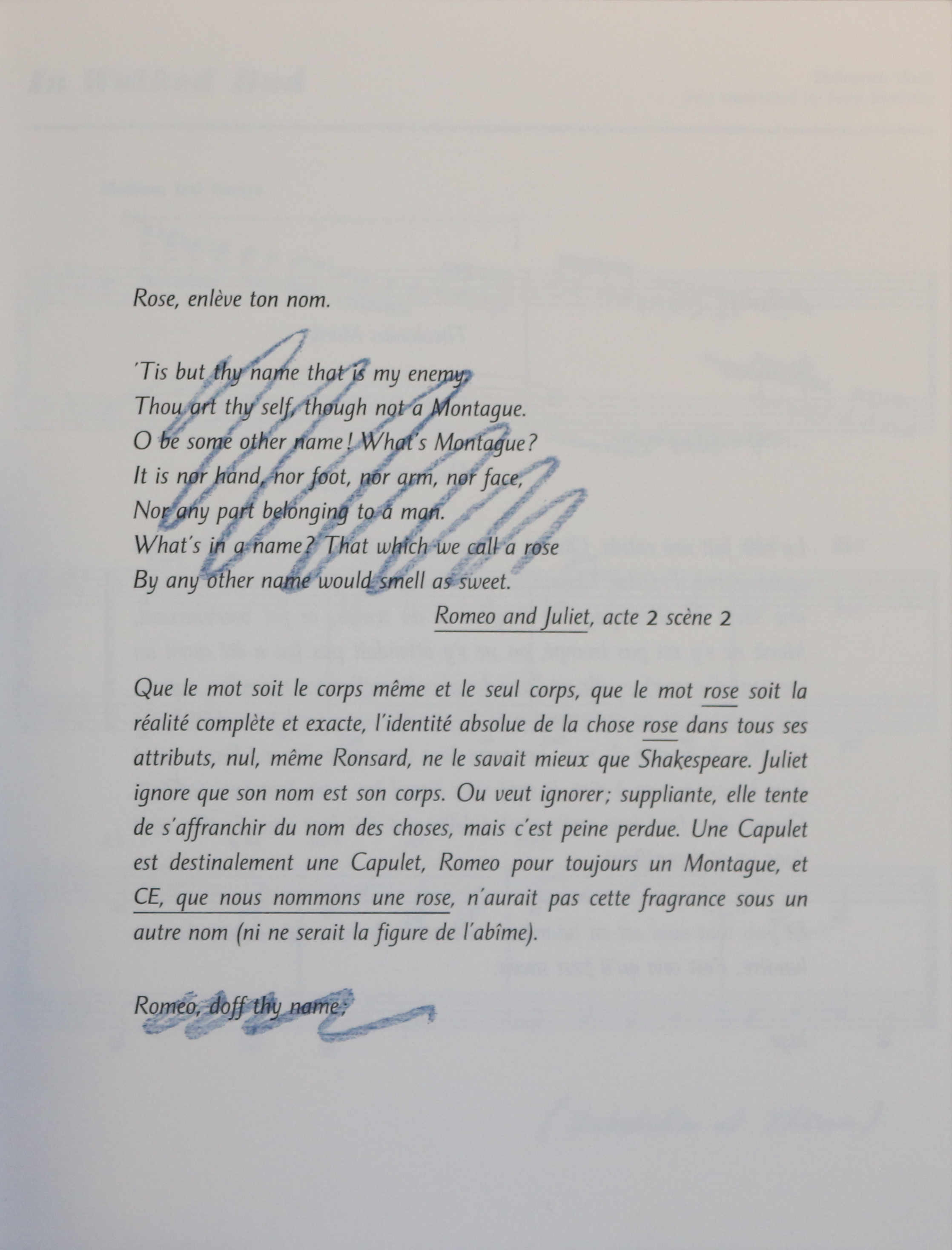 Photo du poème